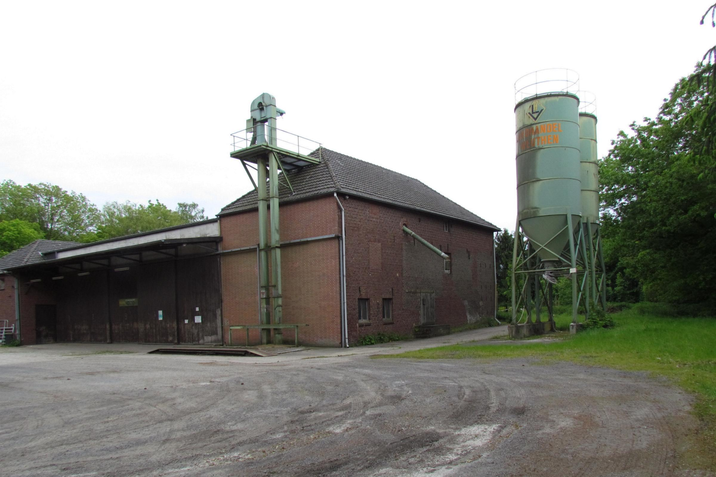 Die Wirtschaftsgebäude der Weuthenmühle